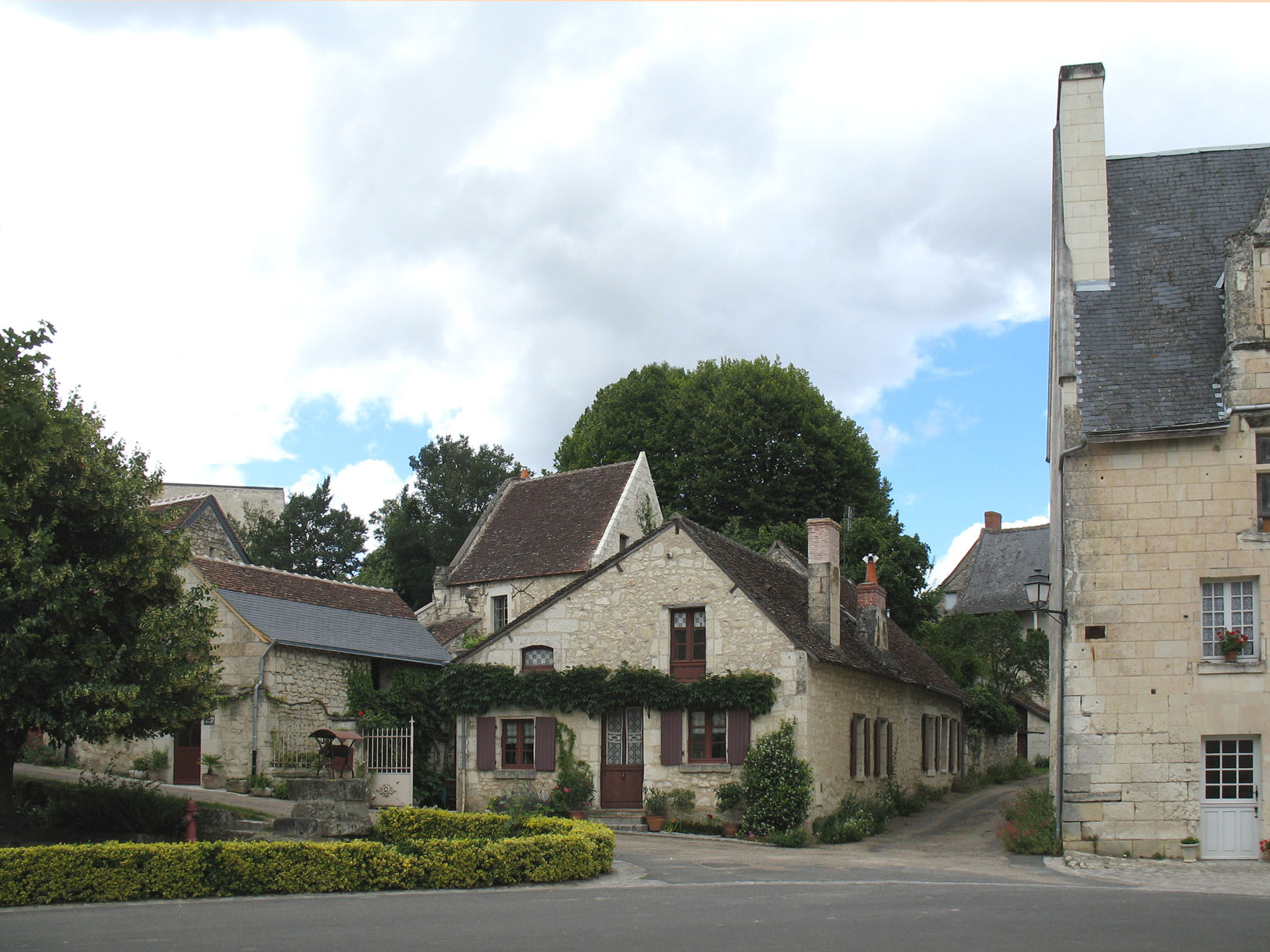 Crissay-sur-Manse